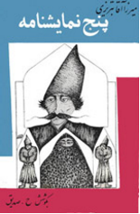 تۆرکجه: ميرزا آقا منشي باشي تبريزی مترجم ناصر الدين شاه قاجارین خاریجی ایشلر ناظیری‌نین کیتابی، دوقتور حسین محمدزاده صدیقین چالیشماسی ایله تۆرکجه: اثر ميرزا آقا منشي باشي تبريزي مترجم وزارت امور خارجه‌ي دولت ناصر الدين شاه قاجار